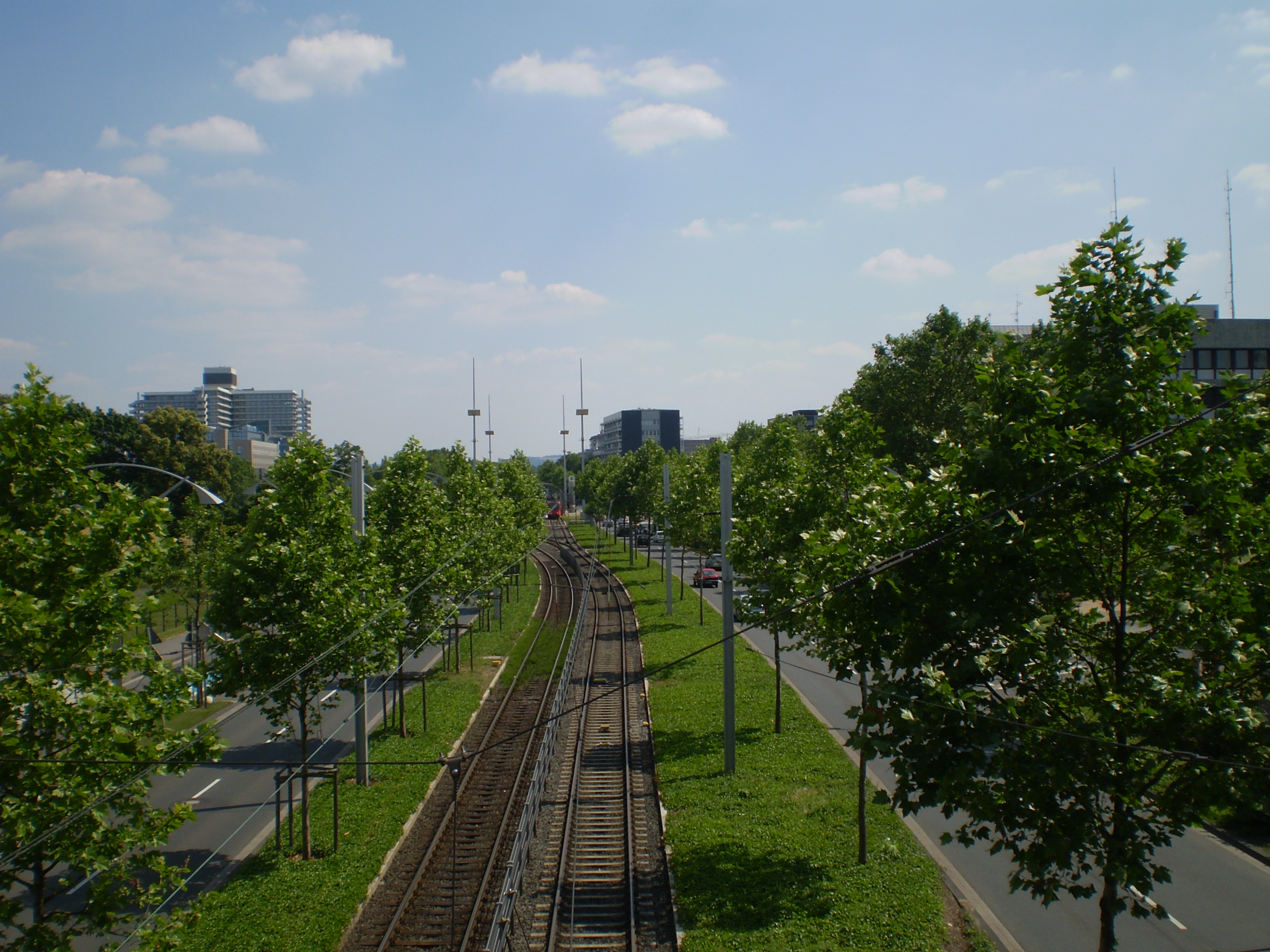 Friedrich-Ebert-Allee (Teil der sogenannten „Bundesallee“) und Stadtbahngleise auf der Höhe des Office Ports, Blick Richtung Süden, Bonn-Gronau